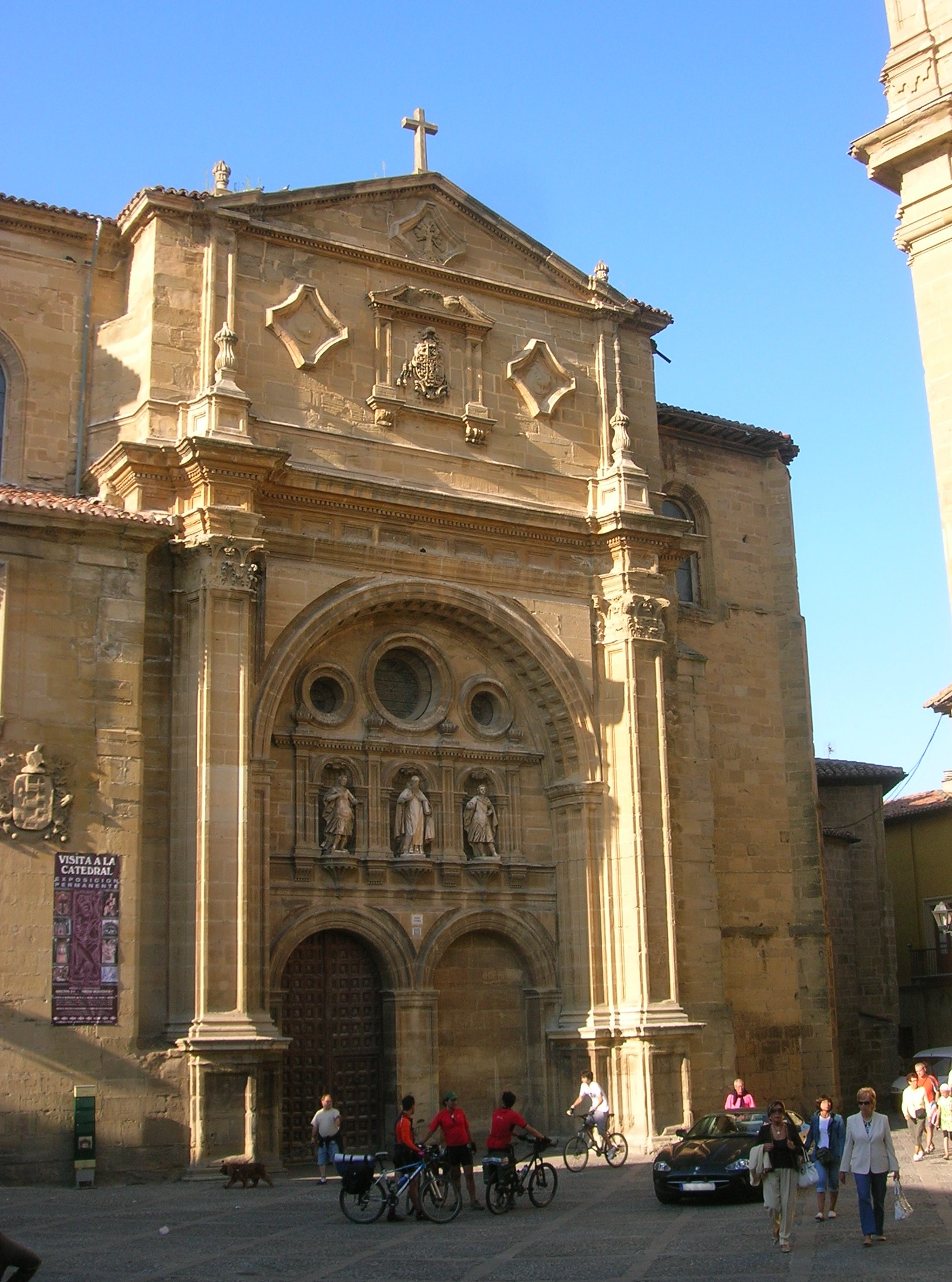 Catedral de Santo Domingo